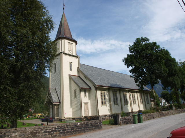 Hjørundfjord kyrkje, Sæbø, Ørsta,Møre og Romsdal